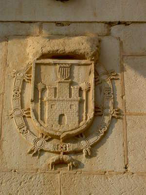 Escudo tallado en piedra del blasón de Monforte del Cid, en la fachada del Ayuntamiento de Monforte.